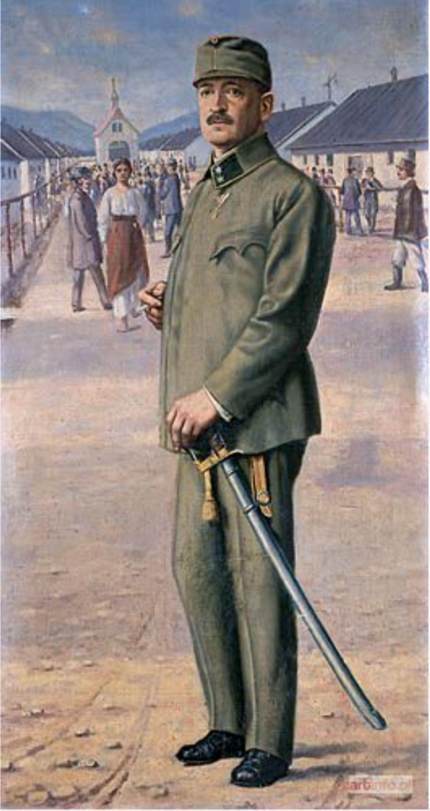 PORTRET OFICERA C.K. ARMII AUSTRO-WĘGIERSKIEJ NADPORUCZNIKA BRONISŁAWA OSTOJA-OSTASZEWSKIEGO